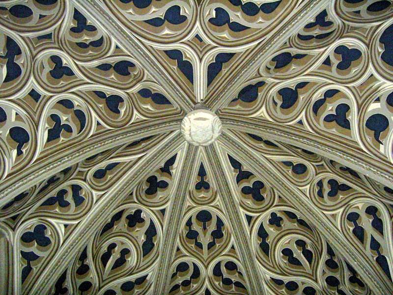 trompe l'oeil de la Cathédrale de Chambéry.